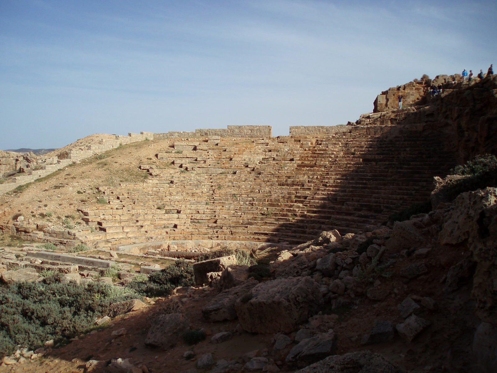 Apollonia, Théâtre vu depuis le bas